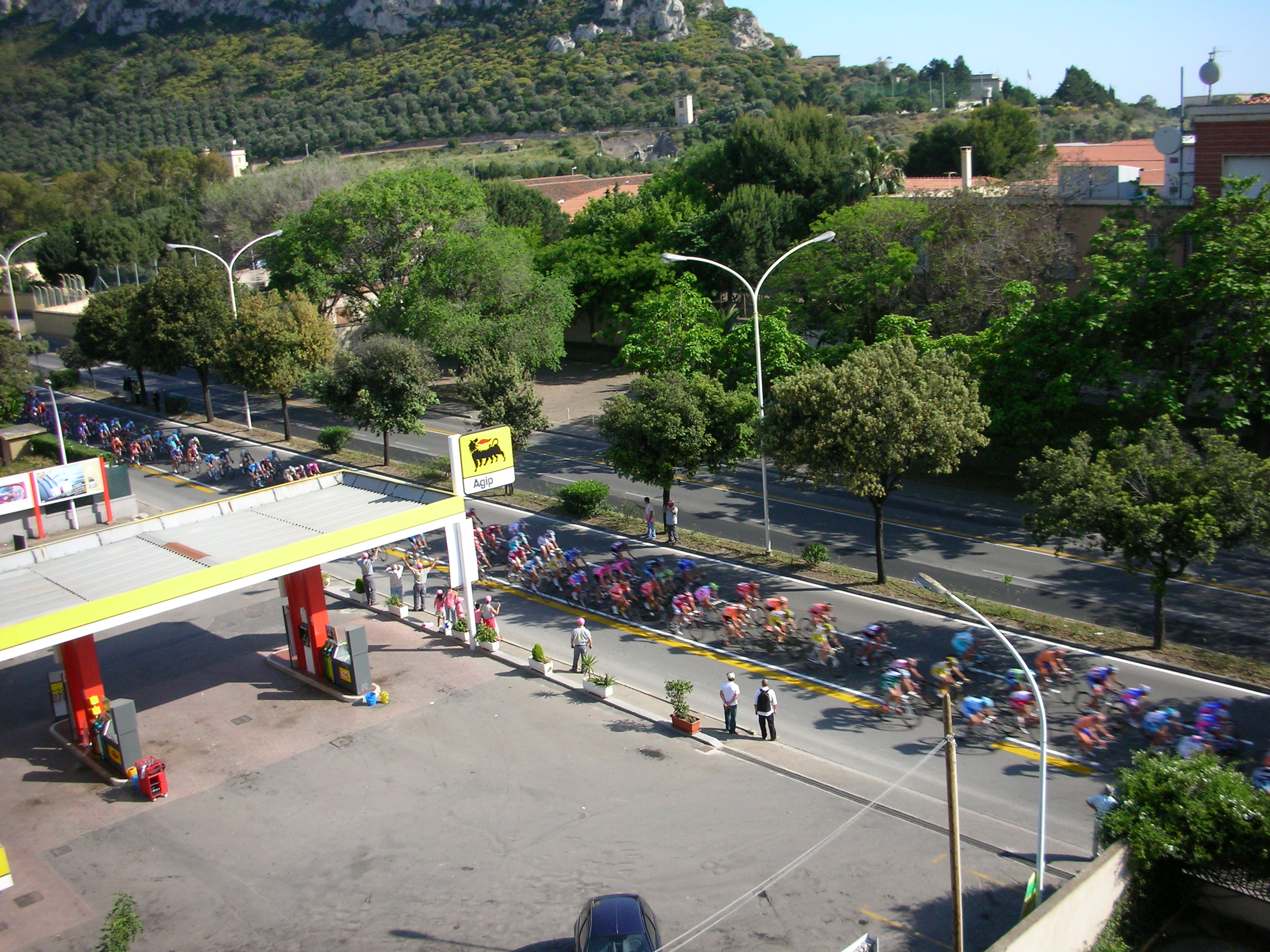 90° Giro d'Italia - 3° tappa - Cagliari (Italy)